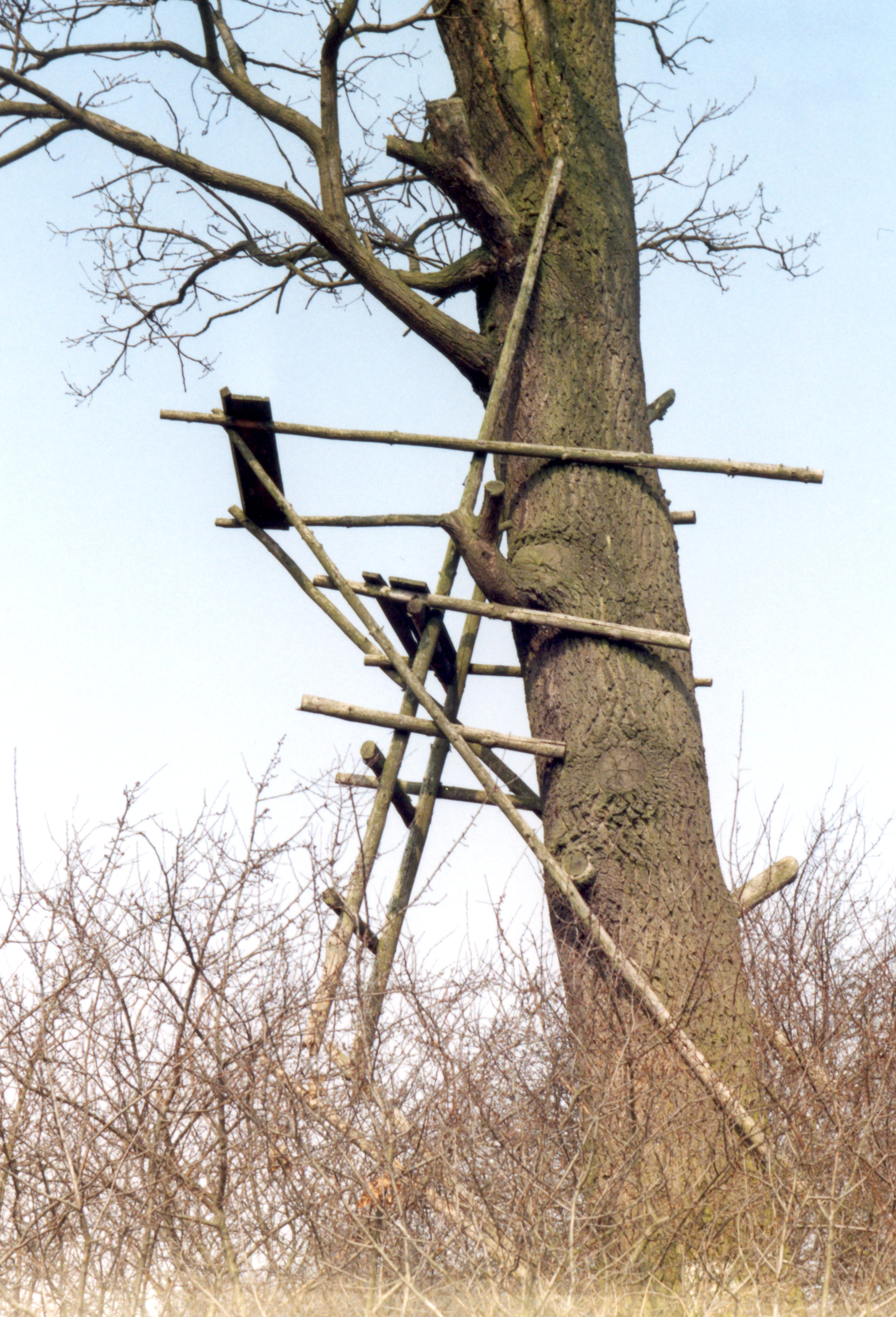 Ambona myśliwska przystawna (siedzisko)